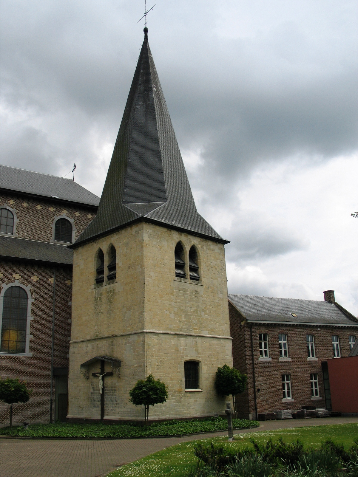 Oude Toren van de kerk van Zonhoven - eigen foto